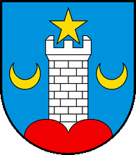 Wappen von Torny-le-Grand Kanton Freiburg Schweiz